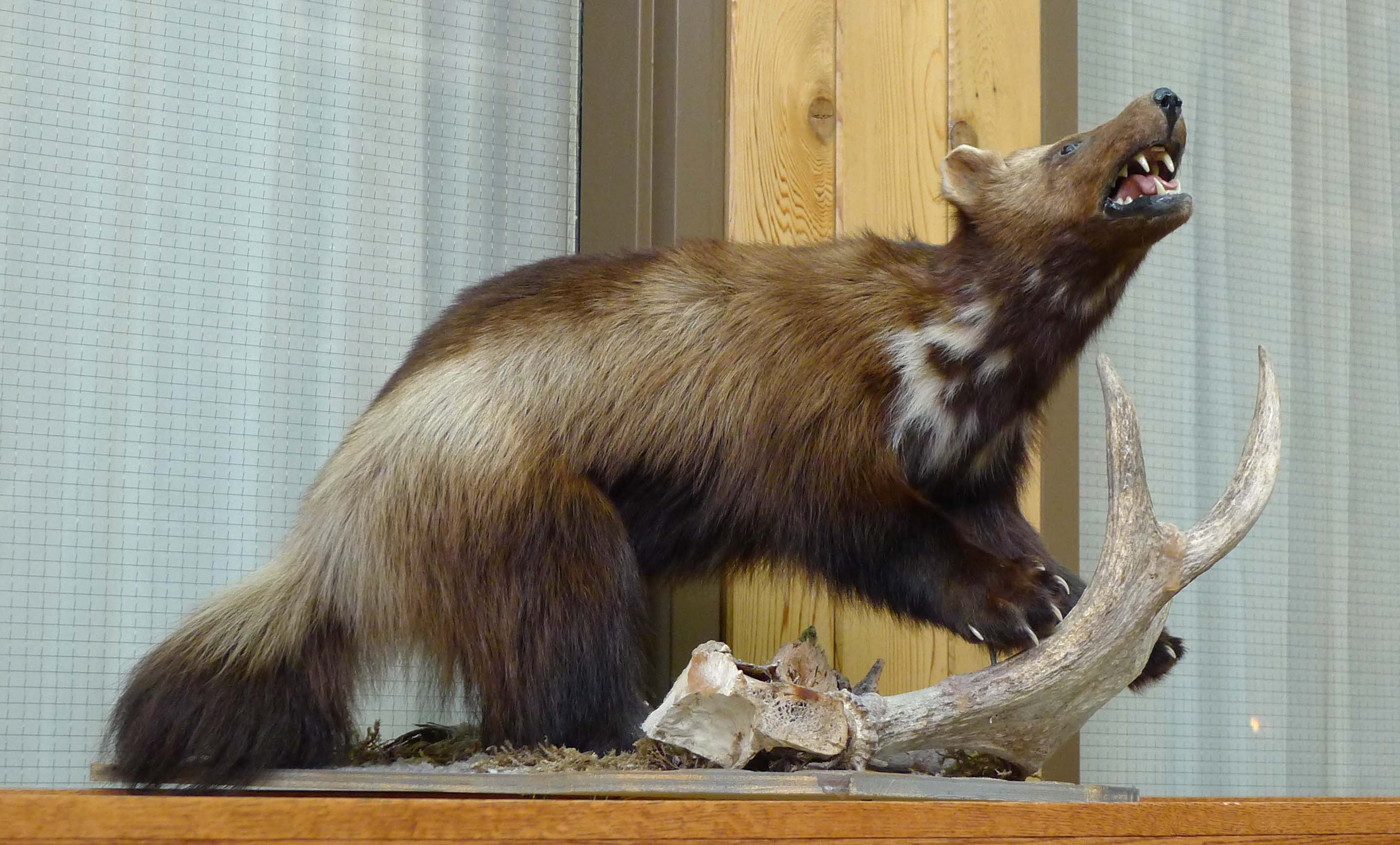 Jasper, Canada